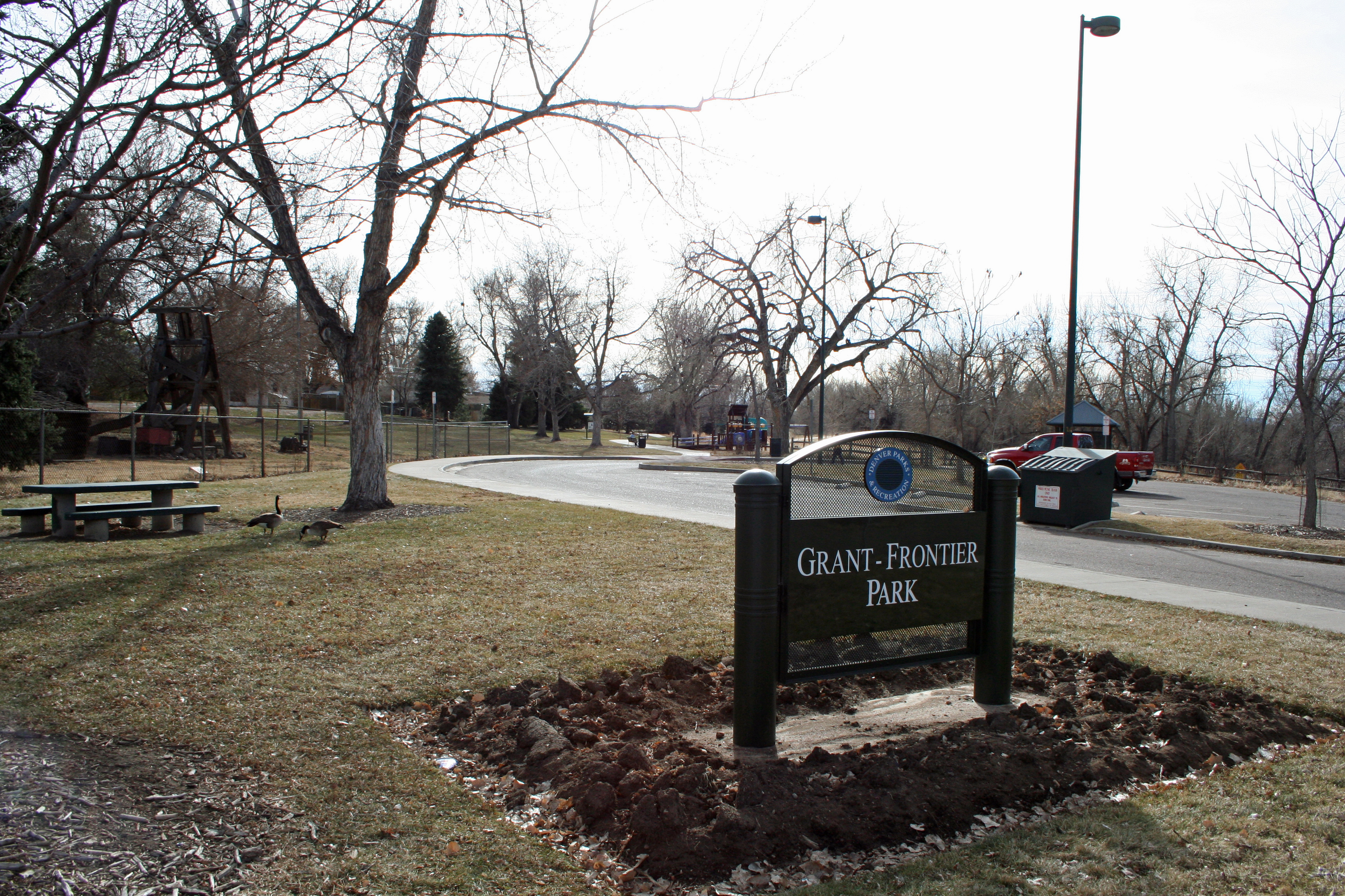 Grant-Frontier Park in Denver, Colorado